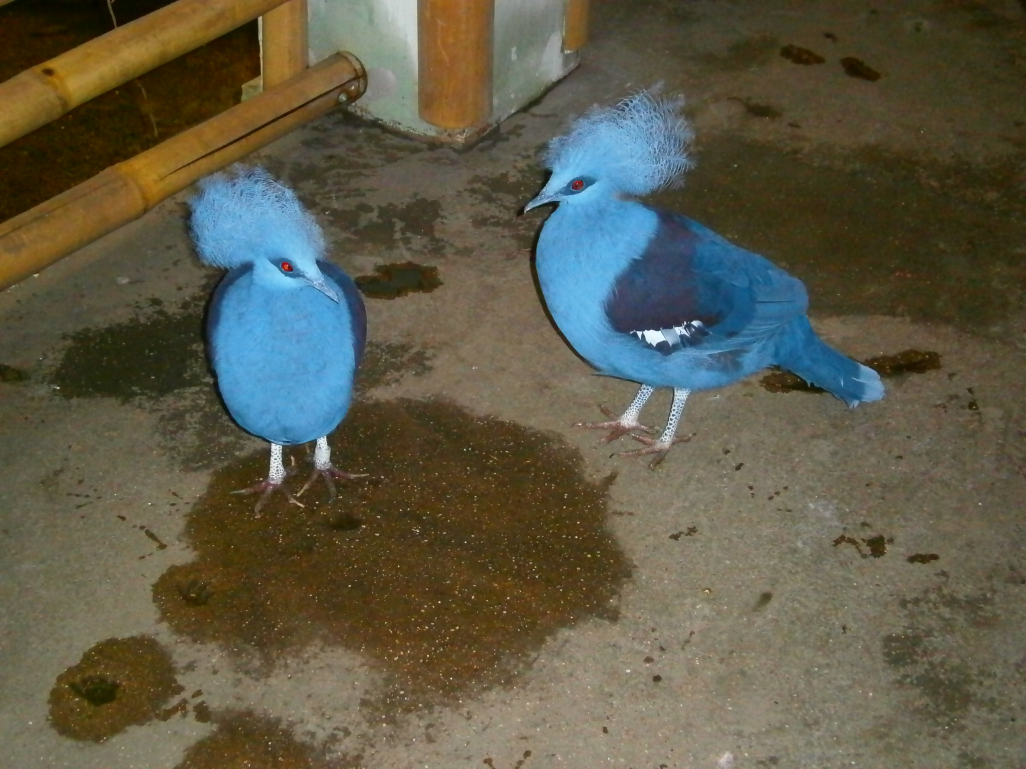 Victoria crowned pigeons in Budapest